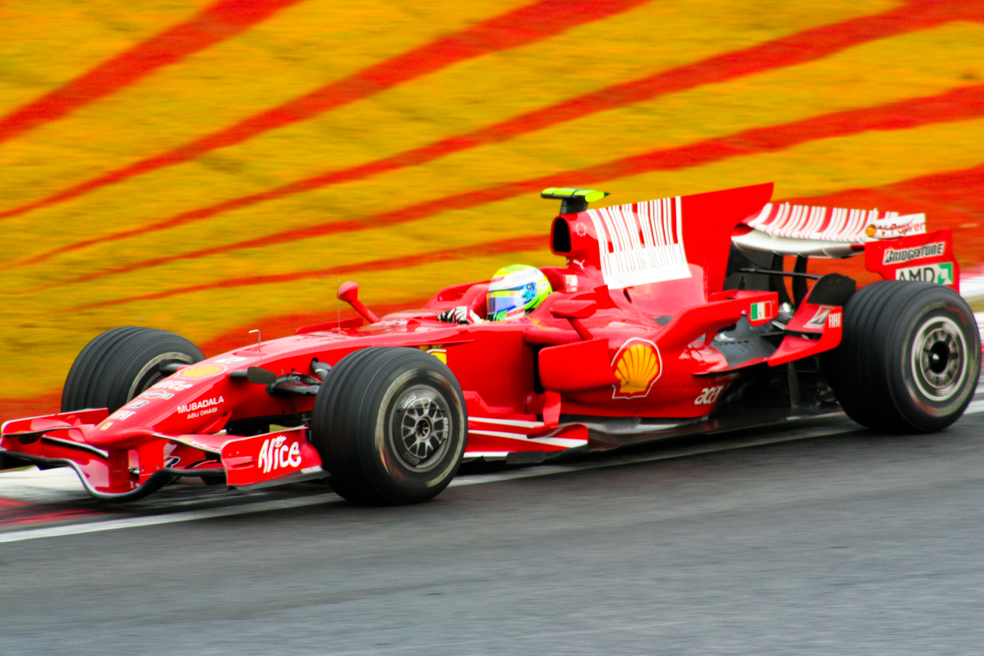 Felipe Massa, winner 2008 Brazilian Grand Prix